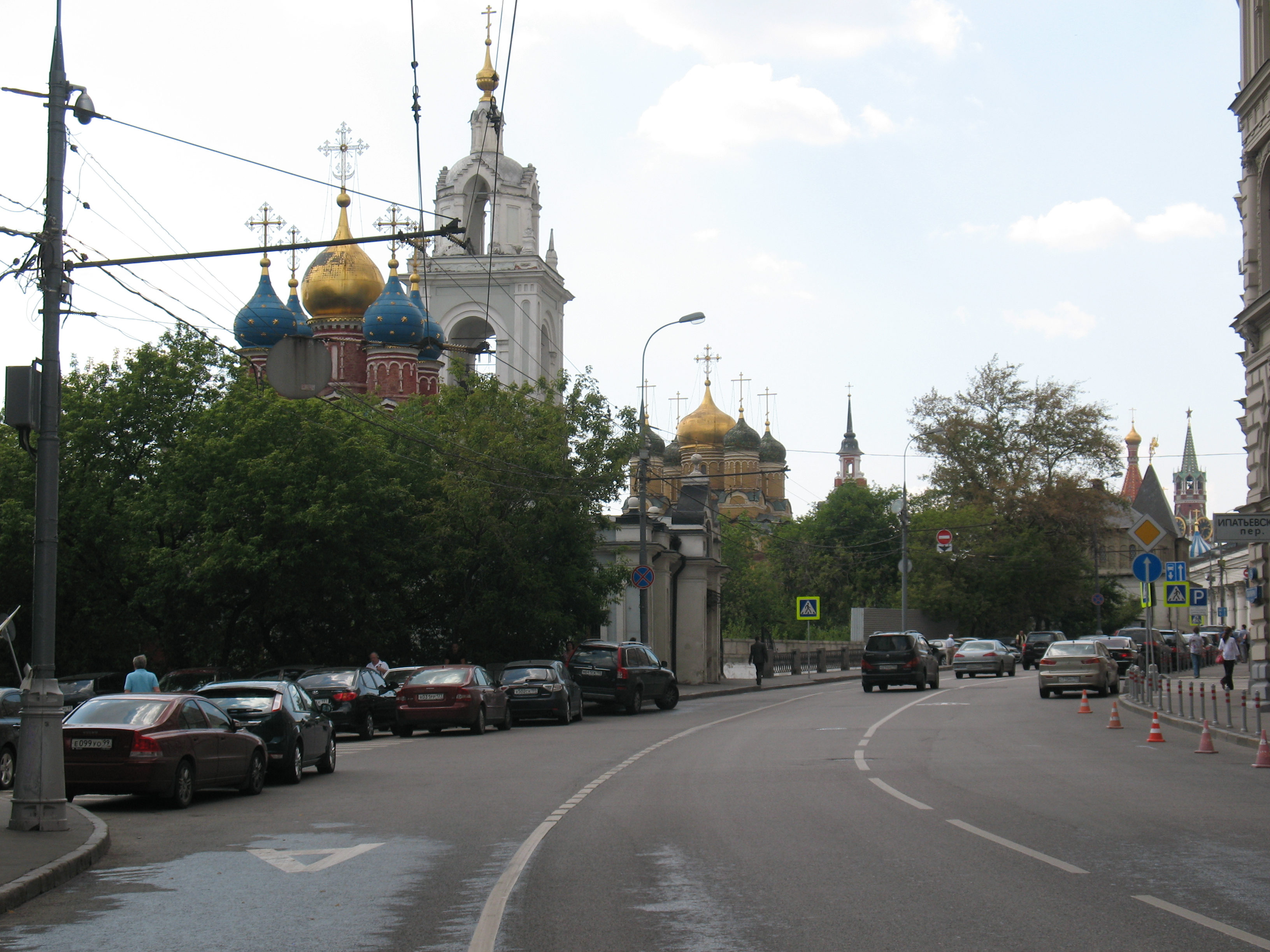 Улица Варварка в Москве, общий вид улицы.